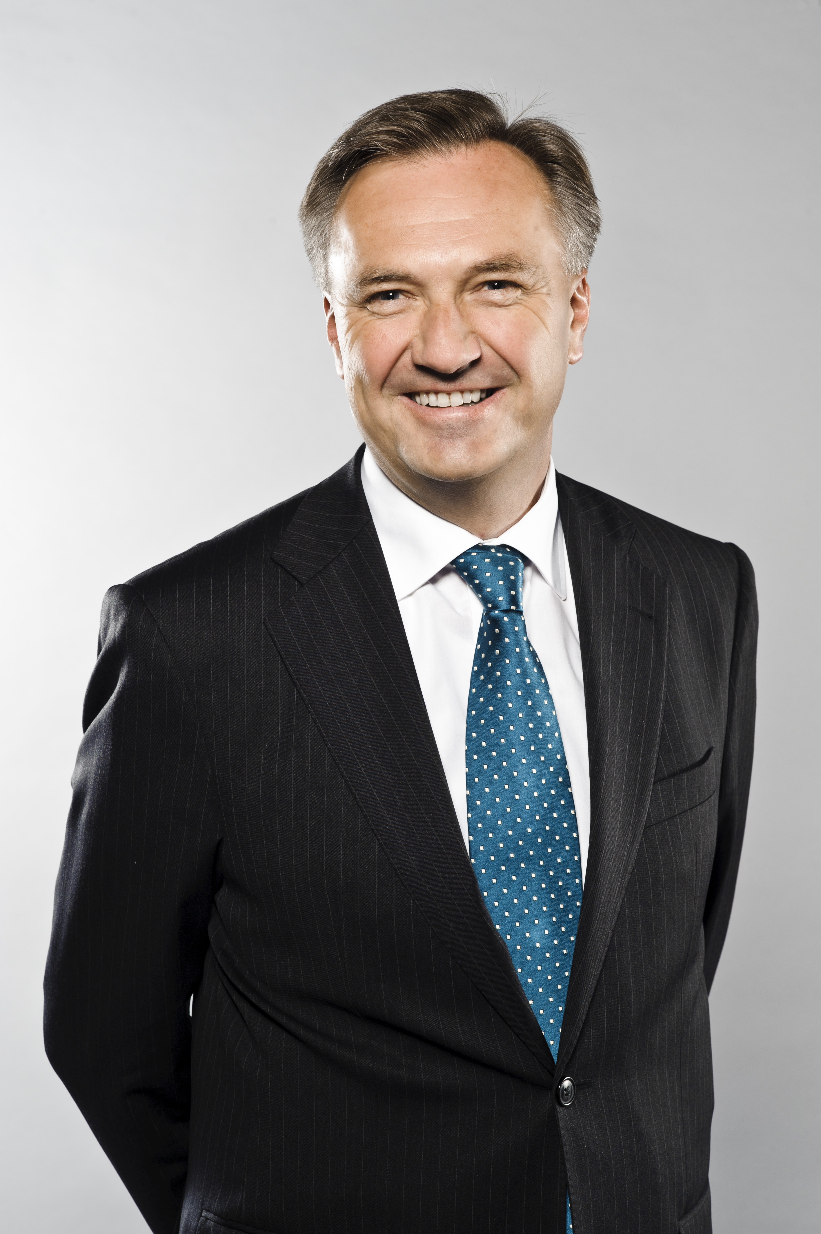 Lars Peder Nordbakken portretter for Akershus Venstre. Fotografert i studioet i Rosenkrantz' gate 7, Oslo. Foto: Gisle Bjørneby 2011